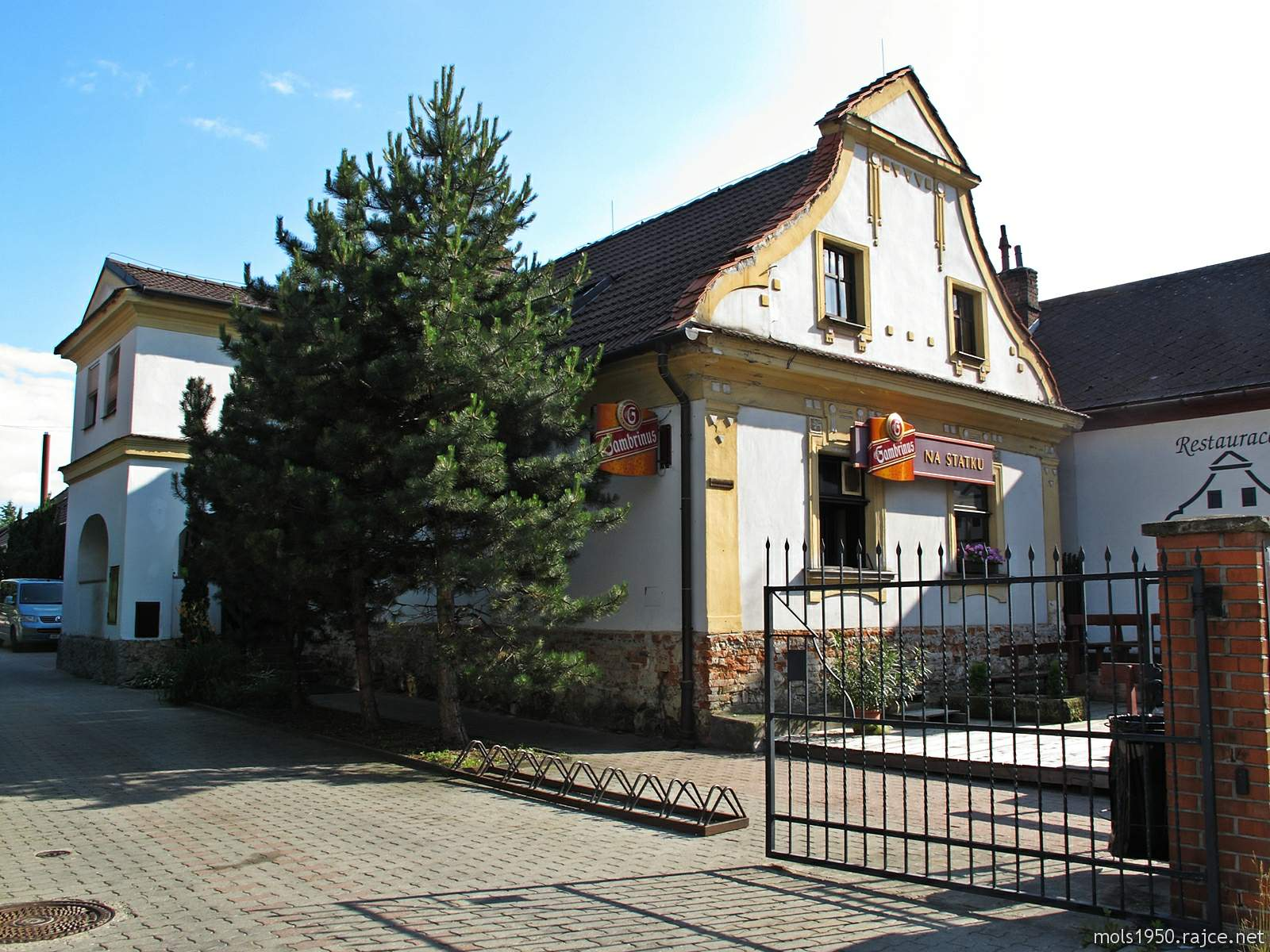 Hlavní 137, Hlavní 92/137, Kylešovice, Opava.